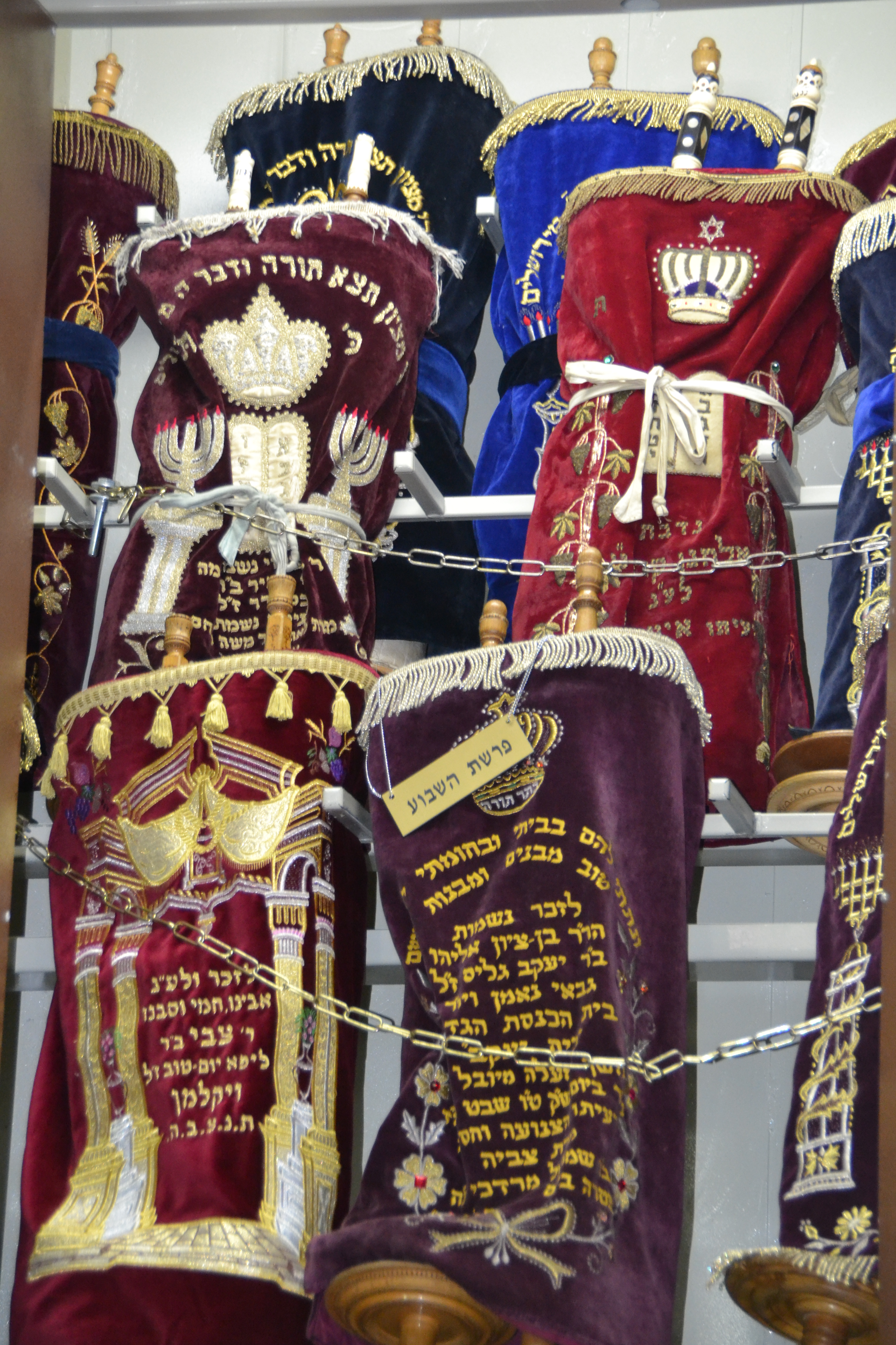 ספרי התורה בארון בית הכנסת הגדול בפתח תקוה